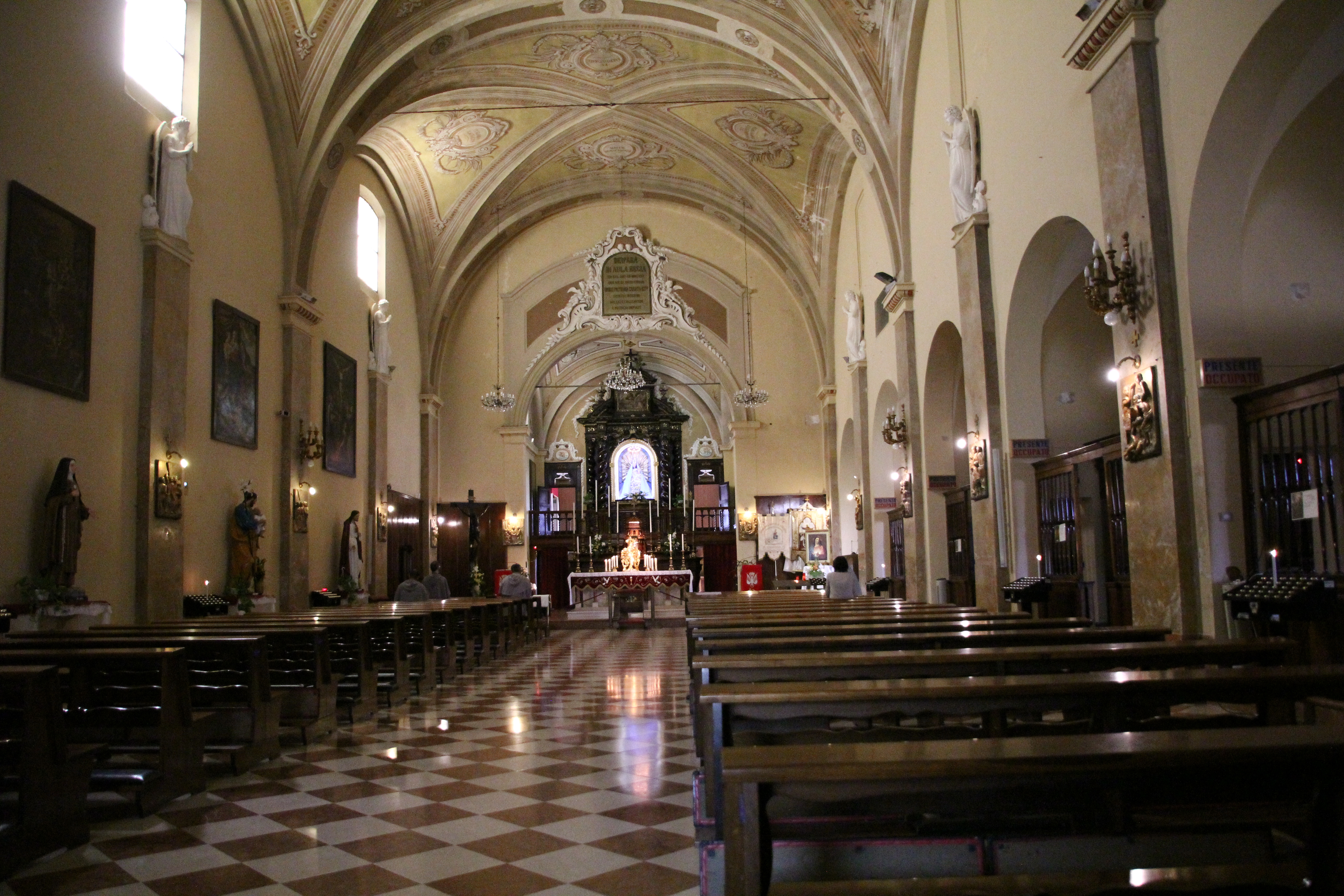 Comacchio, santuario di Santa Maria in Aula Regia